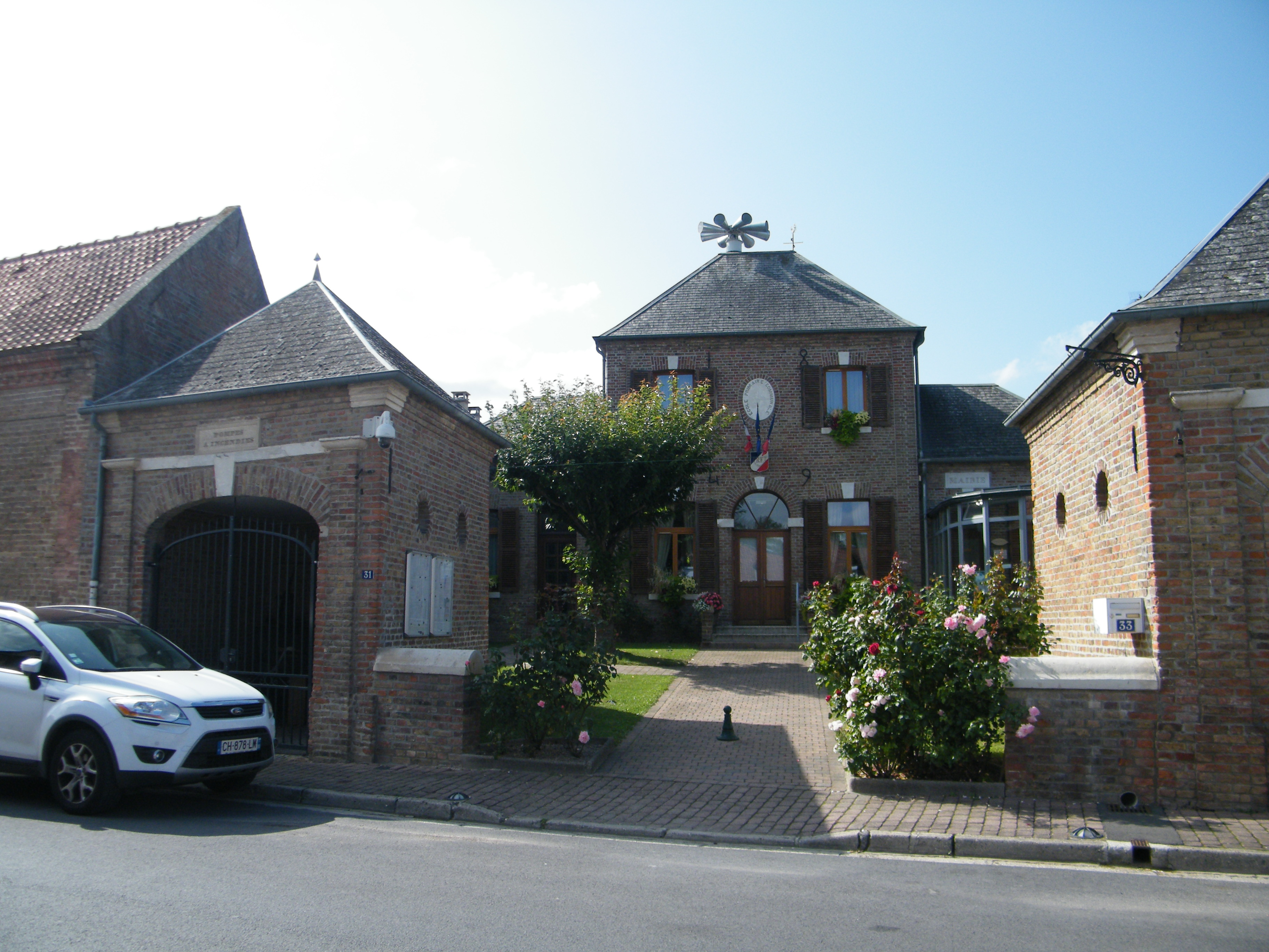 Argoeuves, Somme, Fr, mairie